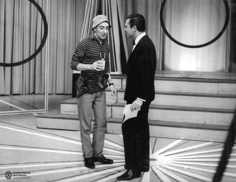 El actor Alberto Olmedo caracterizando a Capitán Piluso en Canal 7, junto al presentador Augusto Bonardo, 1962. AGN_DDF/ Caja 209, inv: 290601.